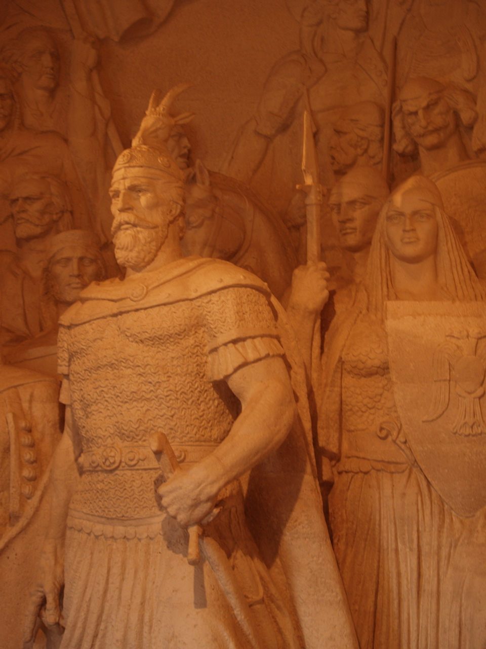 Kruje Albania